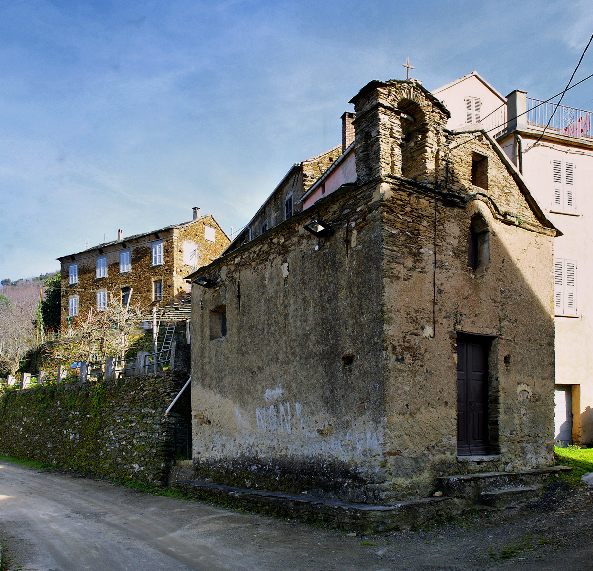 Ficaja - Chapelle San Roccu, de la fin du XVIe siècle (?)